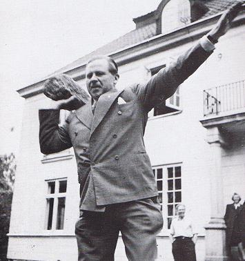 Gunnar Sträng demonsterar sin Styrka för kursdeltagare på Bommersvik 1958. Sveriges dåvarande finansminister Gunnar Sträng på Bommersvik 1958.